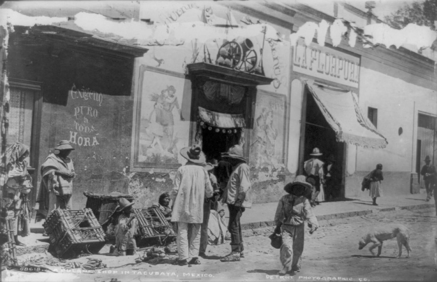 Pulqueria "la flor pura" en Tacubaya